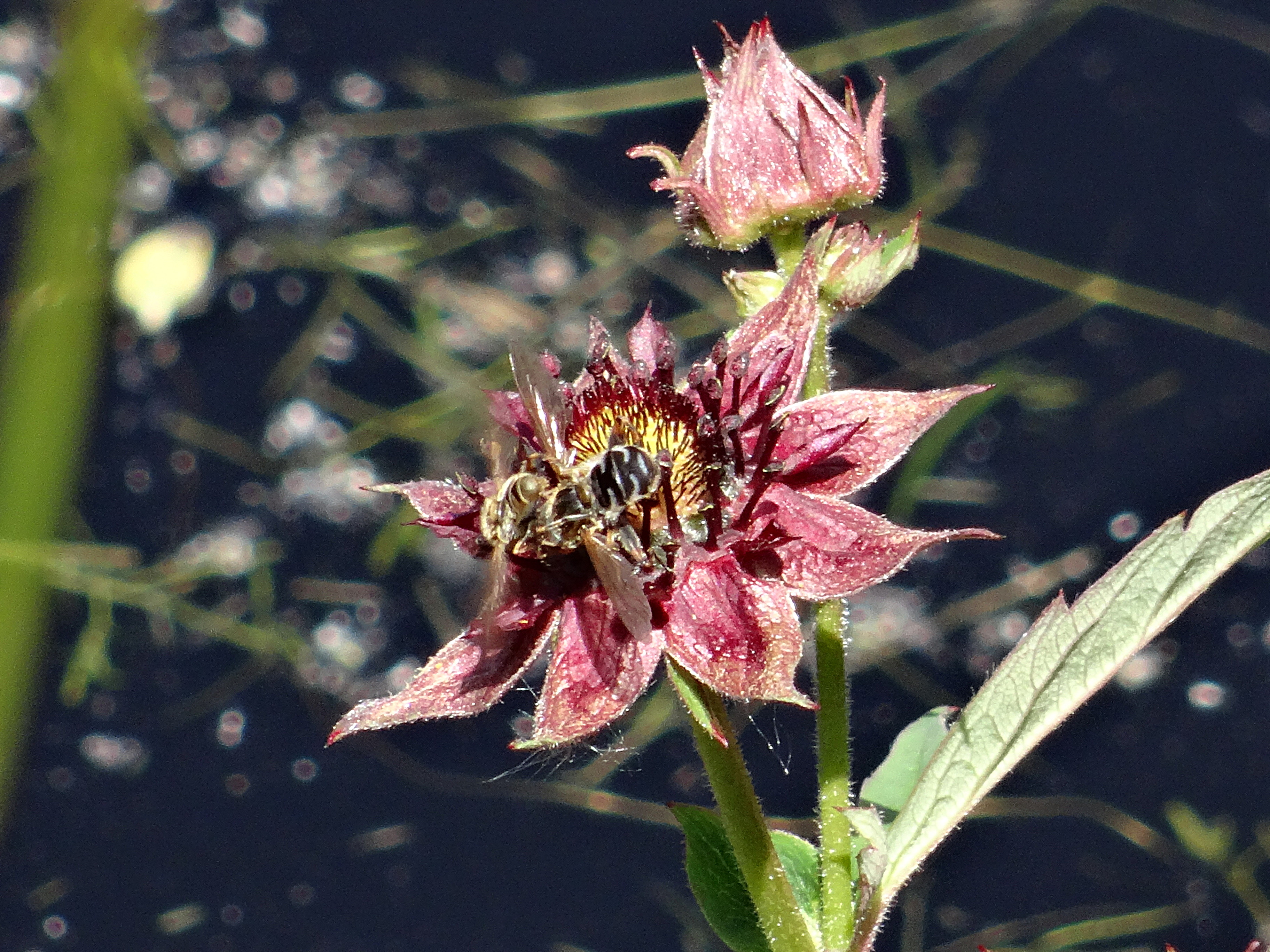 Sumpf-Blutauge (Potentilla palustris) mit Honigdrüsen + Sumpfschwebfliege im Uferbereich des Roten Moores (Rhön)